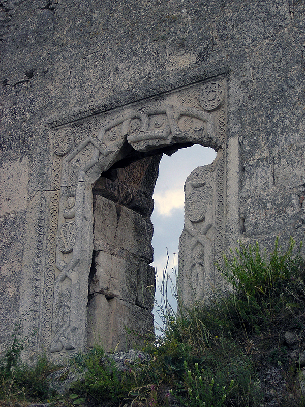 Mangup, Crimea